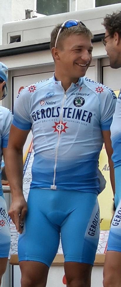 Robert Förster at Sparkassen Giro Bochum